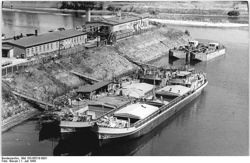 Zentralbild-Biscan 1.7.1959 UP-geschweißte Schiffskörper. Im UP-Schweißer-Wettbewerb der Groß- und Binnenwerften der DDR wurde im ersten Quartal 1959 die Schiffswerft "Edgar André" in Magdeburg Sieger. Die Röntgenprüfung der Unterpulver-Schweißungen der Werft ergab eine Durchschnittsnote von 1.51, was als außerordentlicher Erfolg zu werten ist. Seit dem Bau eines Schweißportals in der Werft ist es möglich, das Unterpulver-Schweißverfahren beim Bau der Schiffe in großem Maßstab anzuwenden. So werden jetzt bei den für den Export bestimmten 700-Tonnen-Motorgüterschiffen 80% aller Stumpfnähte des Mittelschiffs unter Pulver geschweißt. UBz.: Zwei Motorgüterschiffe von 700 tonnen Ladefähigkeit am Ausrüstungskai der Werft. Die beiden für den Export in die Sowjetunion bestimmten Schiffe sind zum Großteil unter Pulver geschweißt worden."